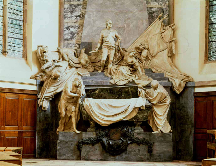 Tomb of Maurice de Saxe by Jean-Baptiste Pigalle